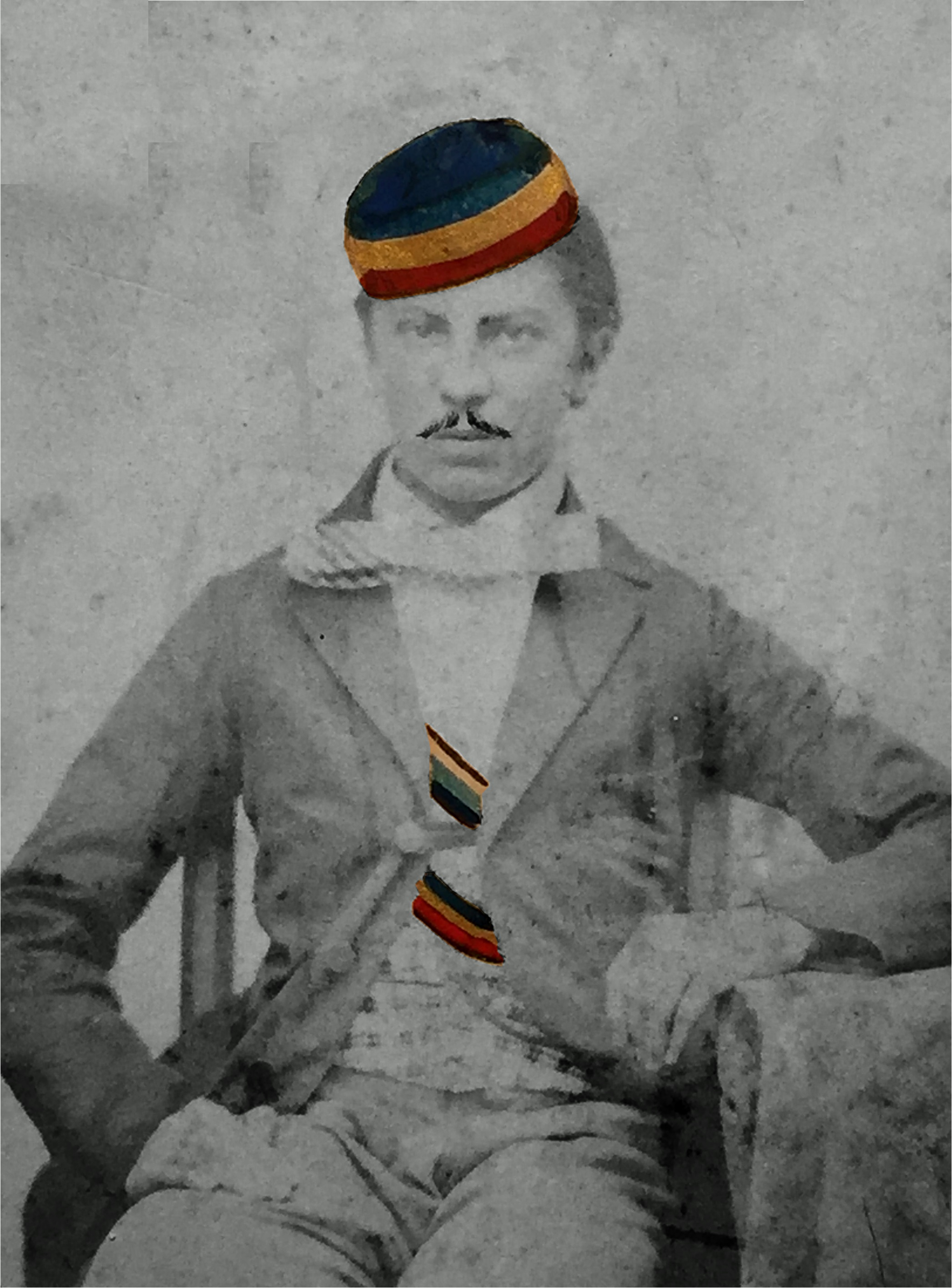 Porträtfotografie von Theodor Vogel als Student in Leipzig